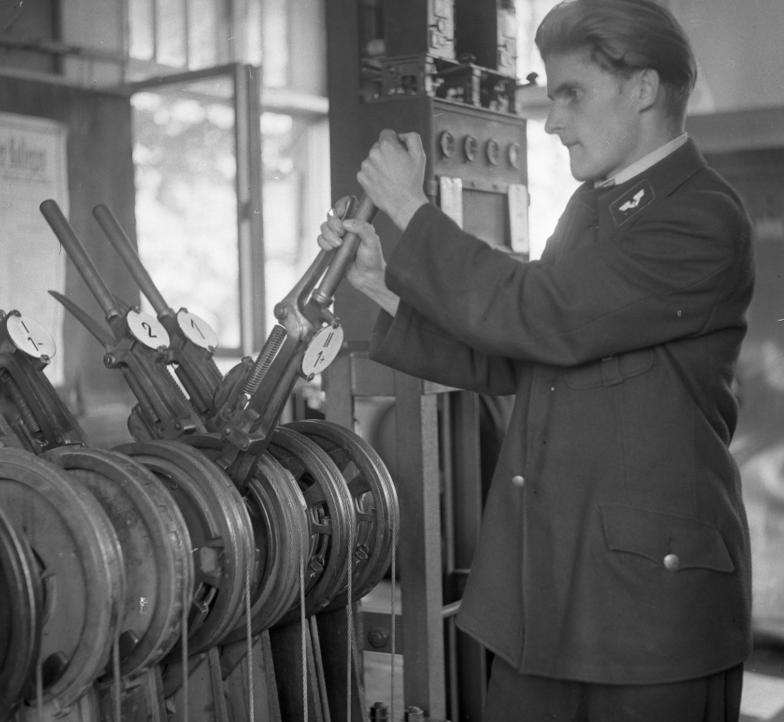 ADN-Zentralbild/ Illus-Igel 28.9.49 Jugendbahnhof Griebnitzsee Auf dem S-Bahnhof "Griebnitzsee" hinter "Babelsberg-Ufastadt" sind von der Reichsbahndirektion nur Jugendliche mit der Durchführung aller verkehrstechnischen Aufgaben betraut worden. UBz: Er weiß genau, worauf es ankommt und führt seine verantwortungsvolle Tätigkeit mit demselben Pflichtbewußtsein durch, wie seine älteren Kollegen auf anderen Bahnhöfen. 4042-49